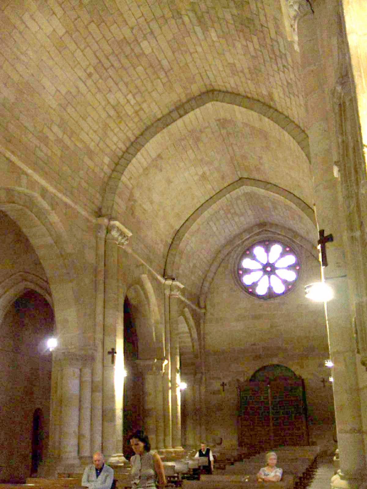 Iglesia de Santo Domingo, Soria